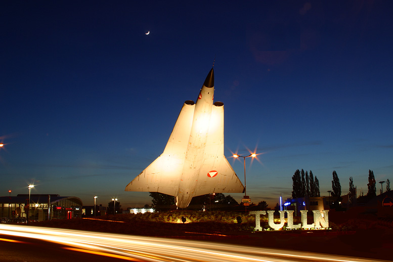 Draken im Kreisel bei Tulln, Österreich